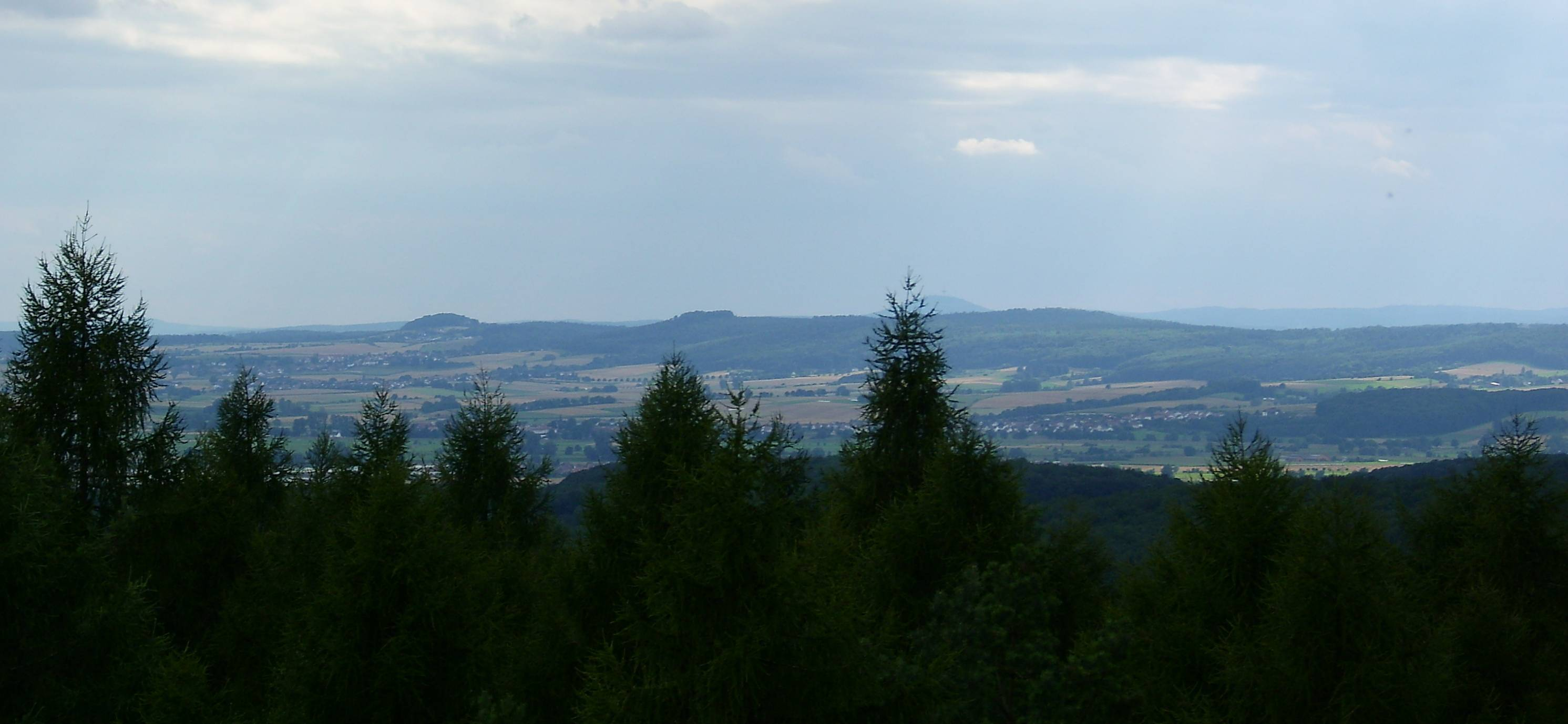 Blick vom 380m hohen Burgholz (Gilserberger Höhen) auf die südlichen Lahnberge mit Frauenberg (370m, halblinks), Stempel (365m, Mitte) und Lichtem Küppel (368m, halbrechts) sowie zum dahinter liegenden Dünsberg (498m), rechts der Mitte) und anderen Erhebungen des Gladenbacher Berglandes (rechts))